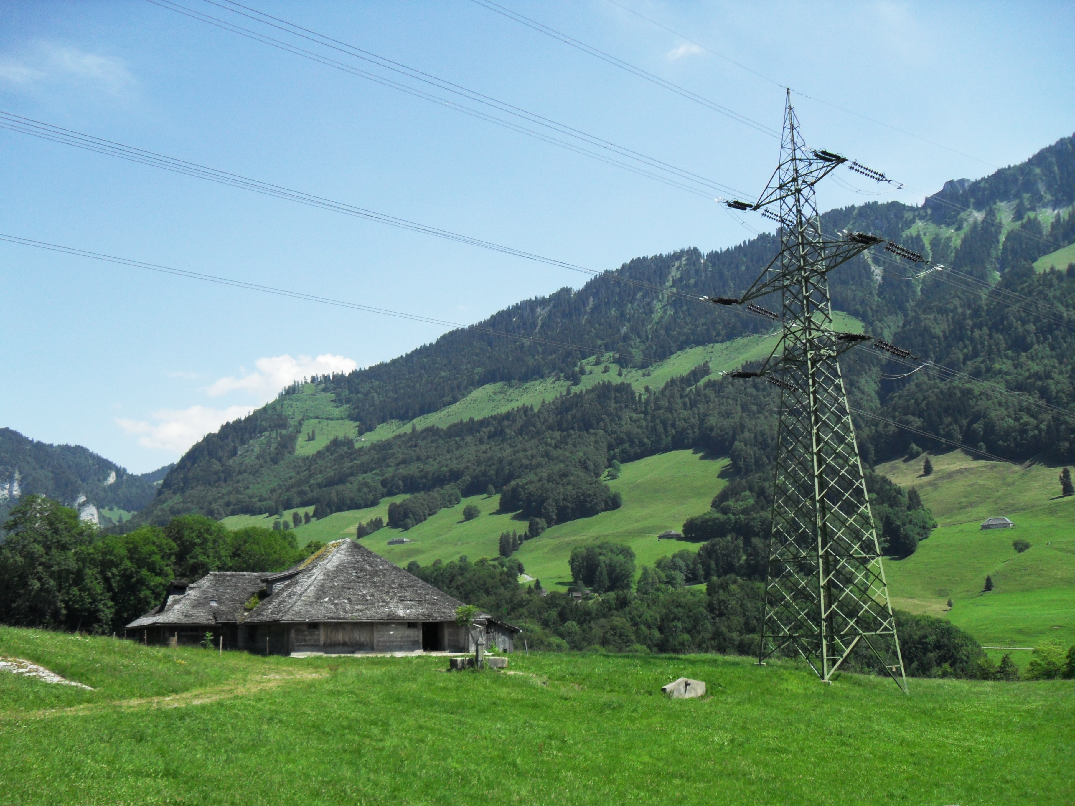 Un alpage près de Châtel-sur-Montsalvens Object location46° 36′ 27.42″ N, 7° 06′ 50.59″ E